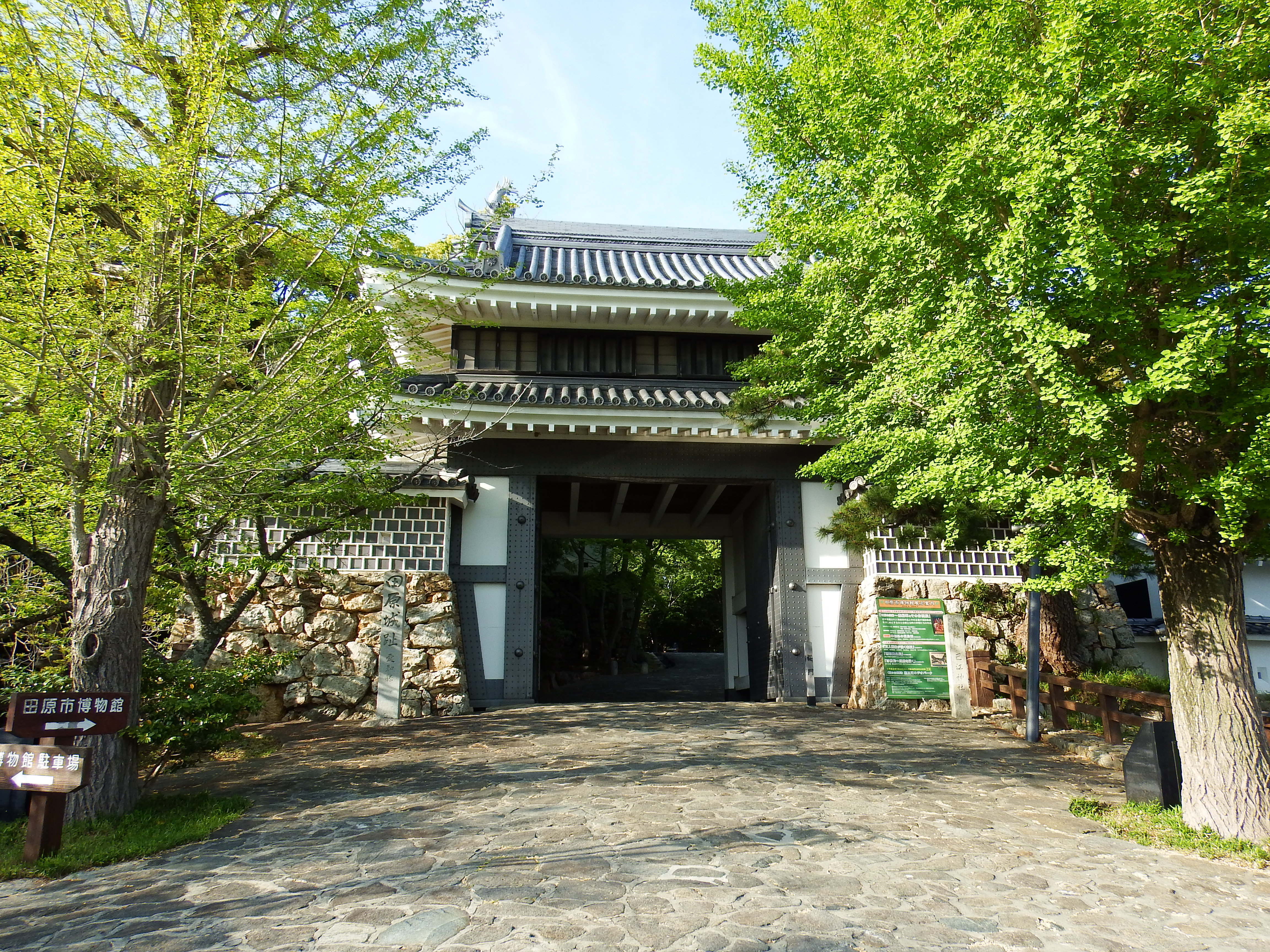 田原城跡（桜門）